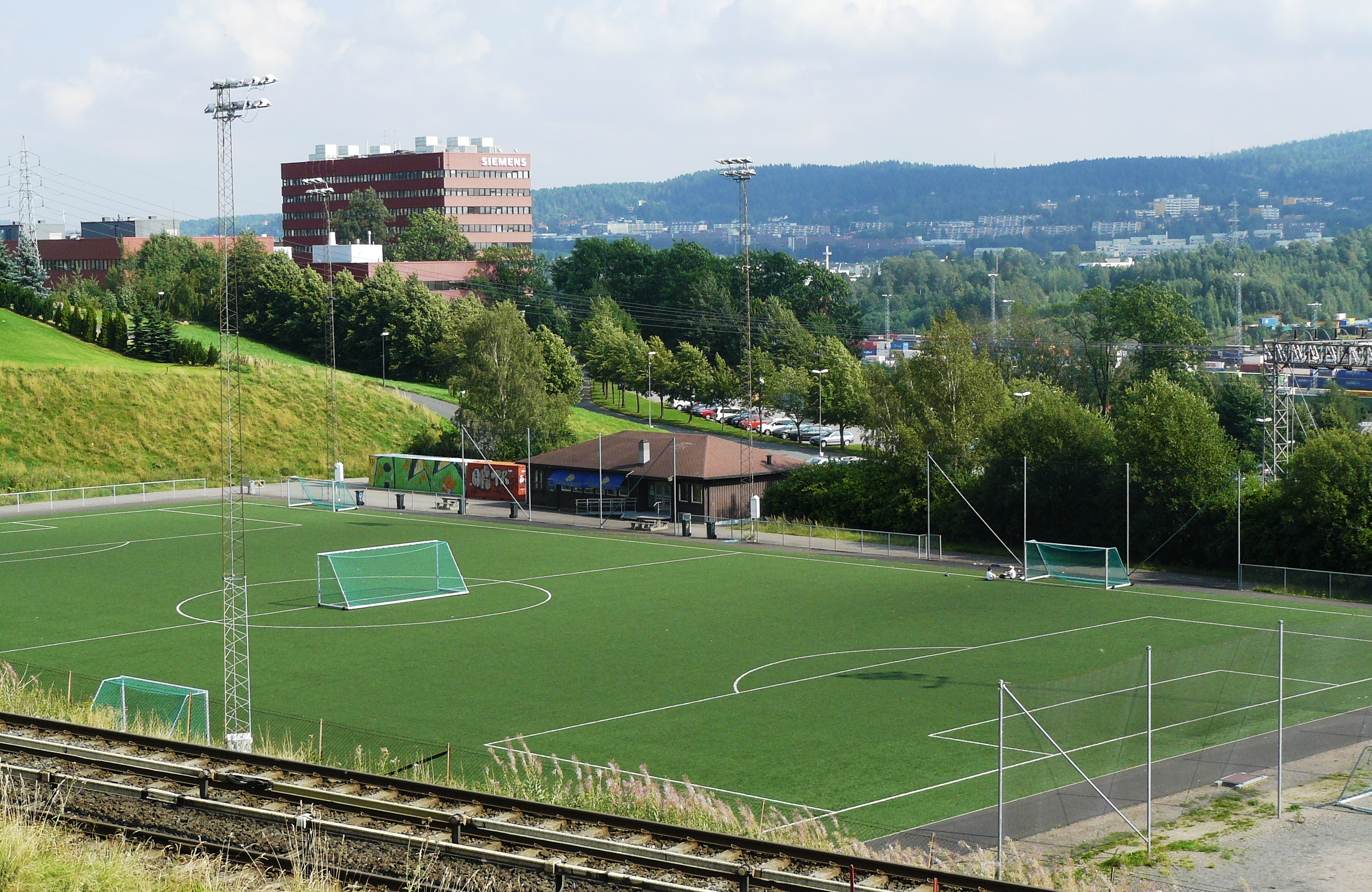 Linderud kunstgress, Oslo